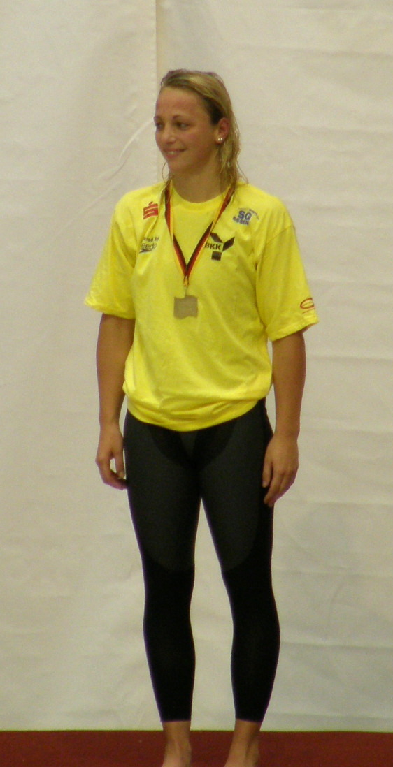 121. DM Schwimmen in Berlin